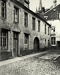 Das 1336 gegründete erste Elisabeth-Hospital in Aachen, auch bekannt als Armen-Hospital "Gasthaus", am Münsterplatz (früher Radermarkt) in Aachen